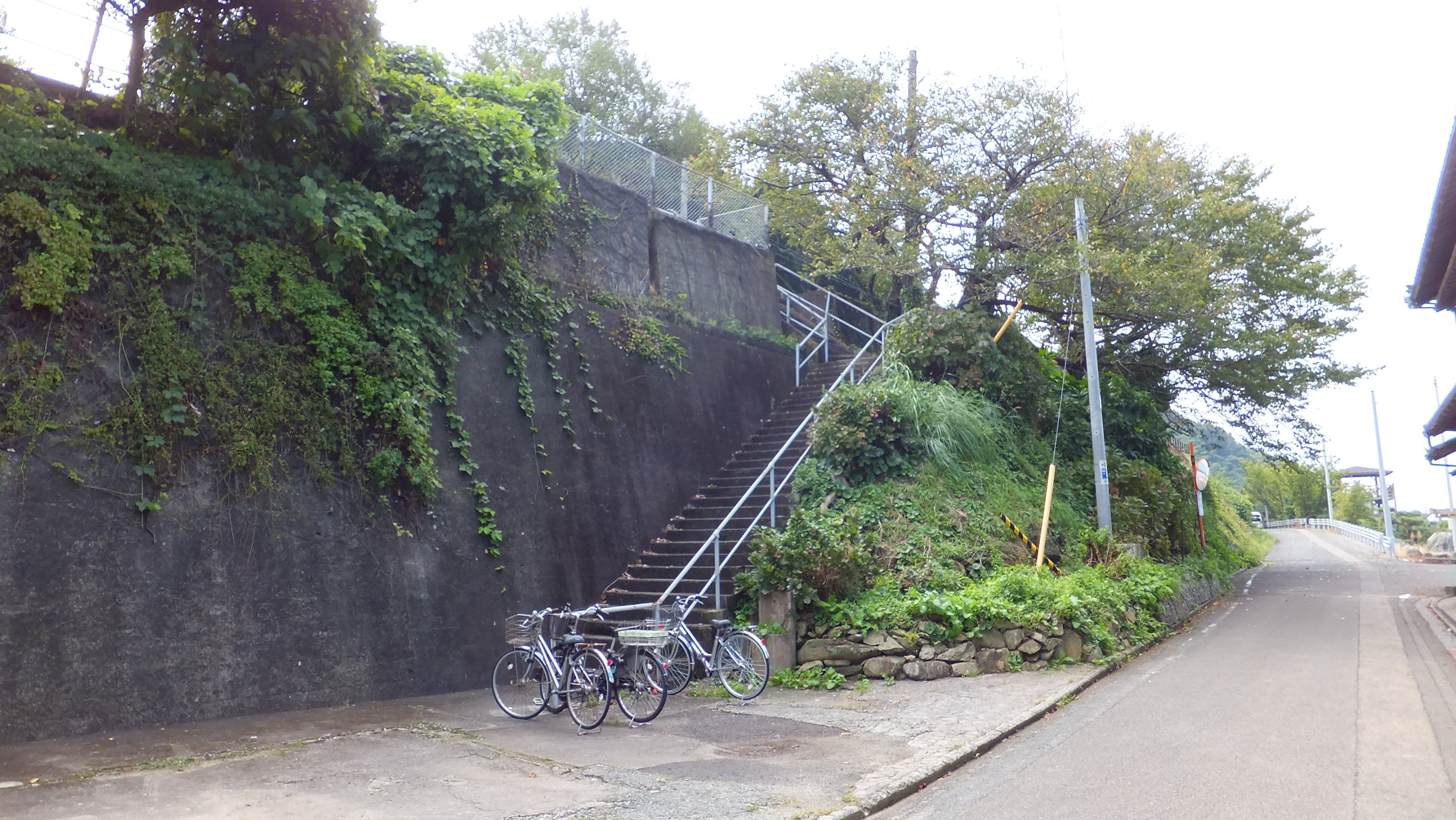 JR予讃線（愛ある伊予灘線）喜多灘駅